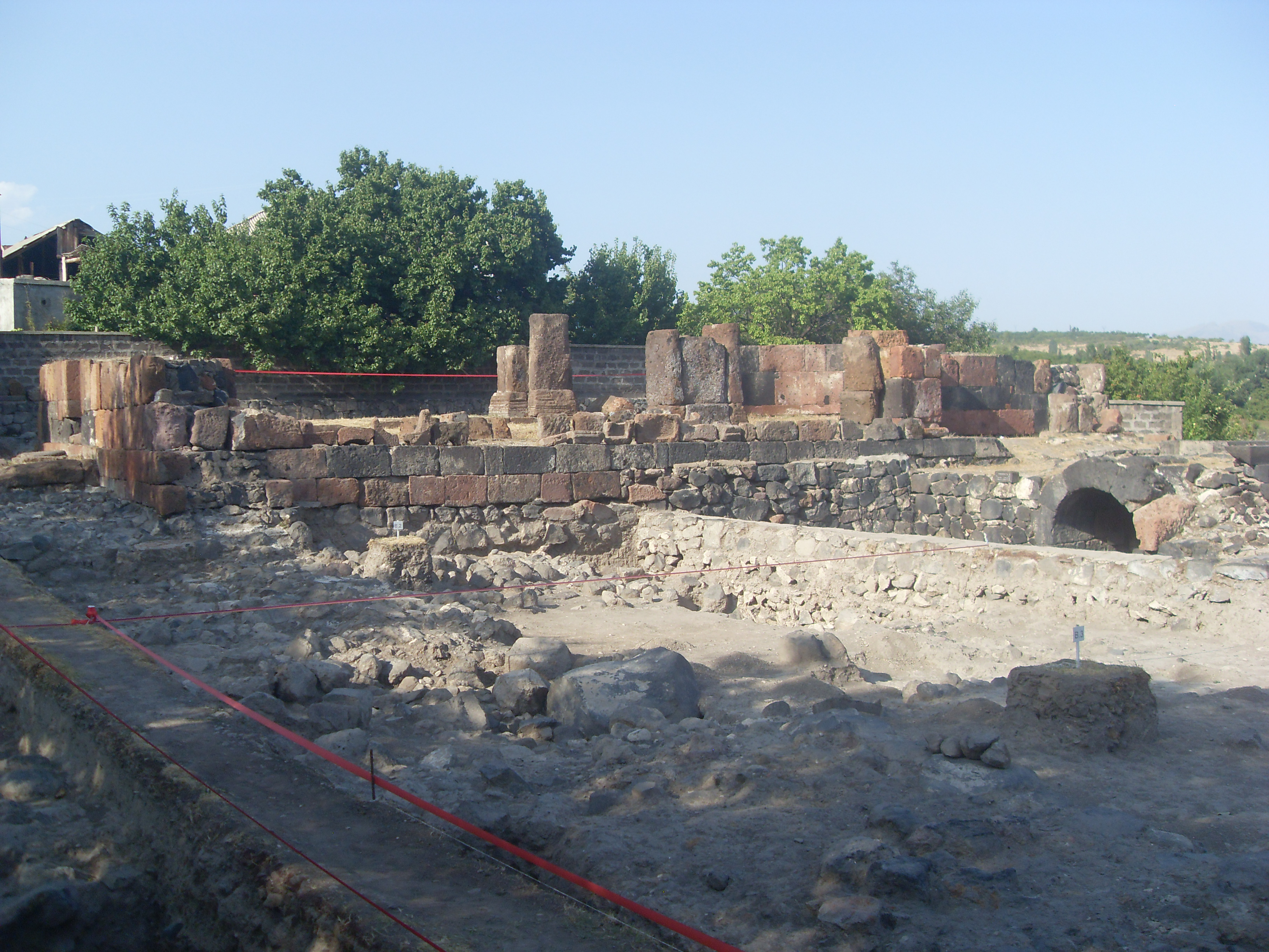 Արշակունյաց թագավորների դամբարան, Աղձք 8/1.1 8/1.2